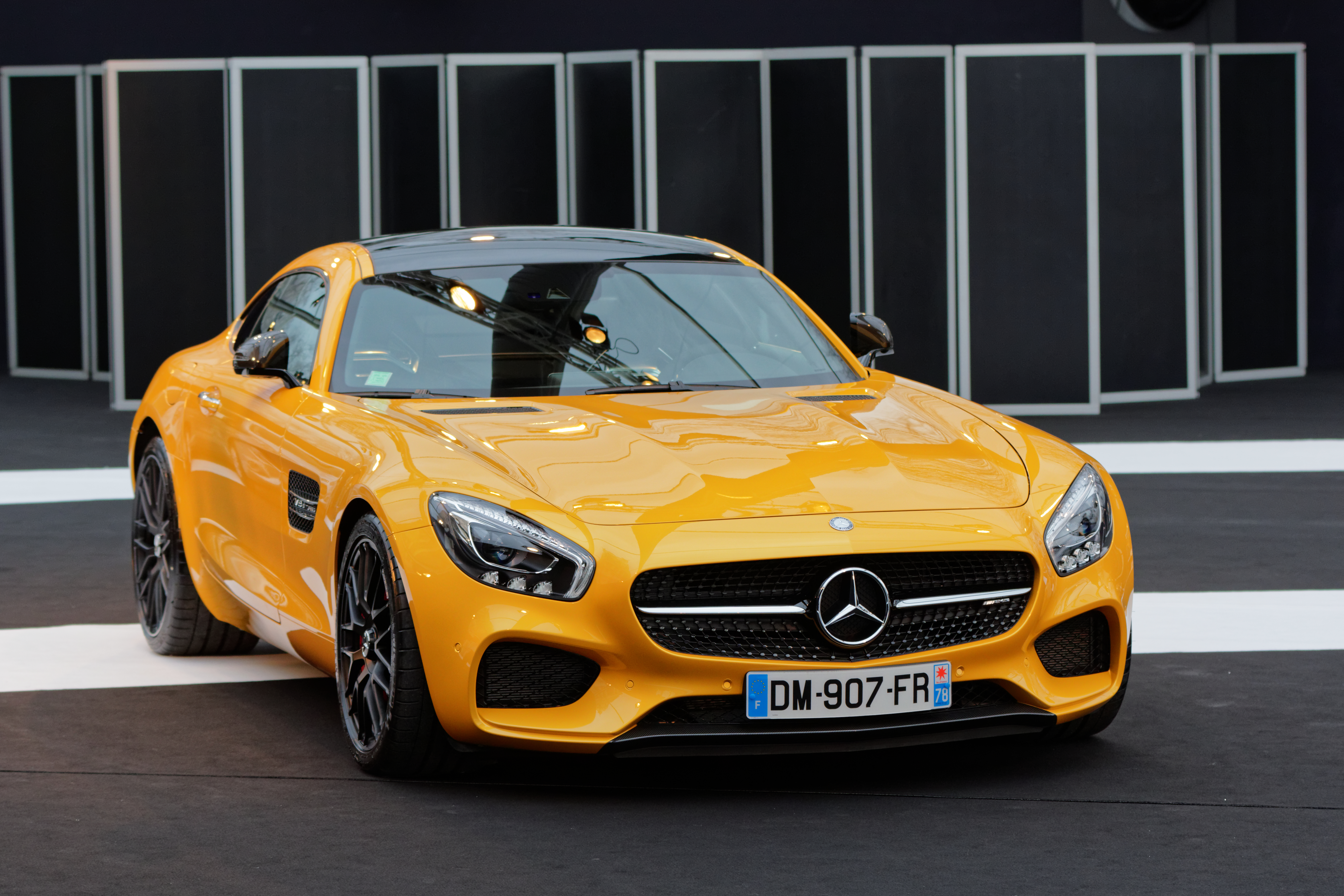 La Mercedes AMG GT exposée lors du festival automobile international 2015.